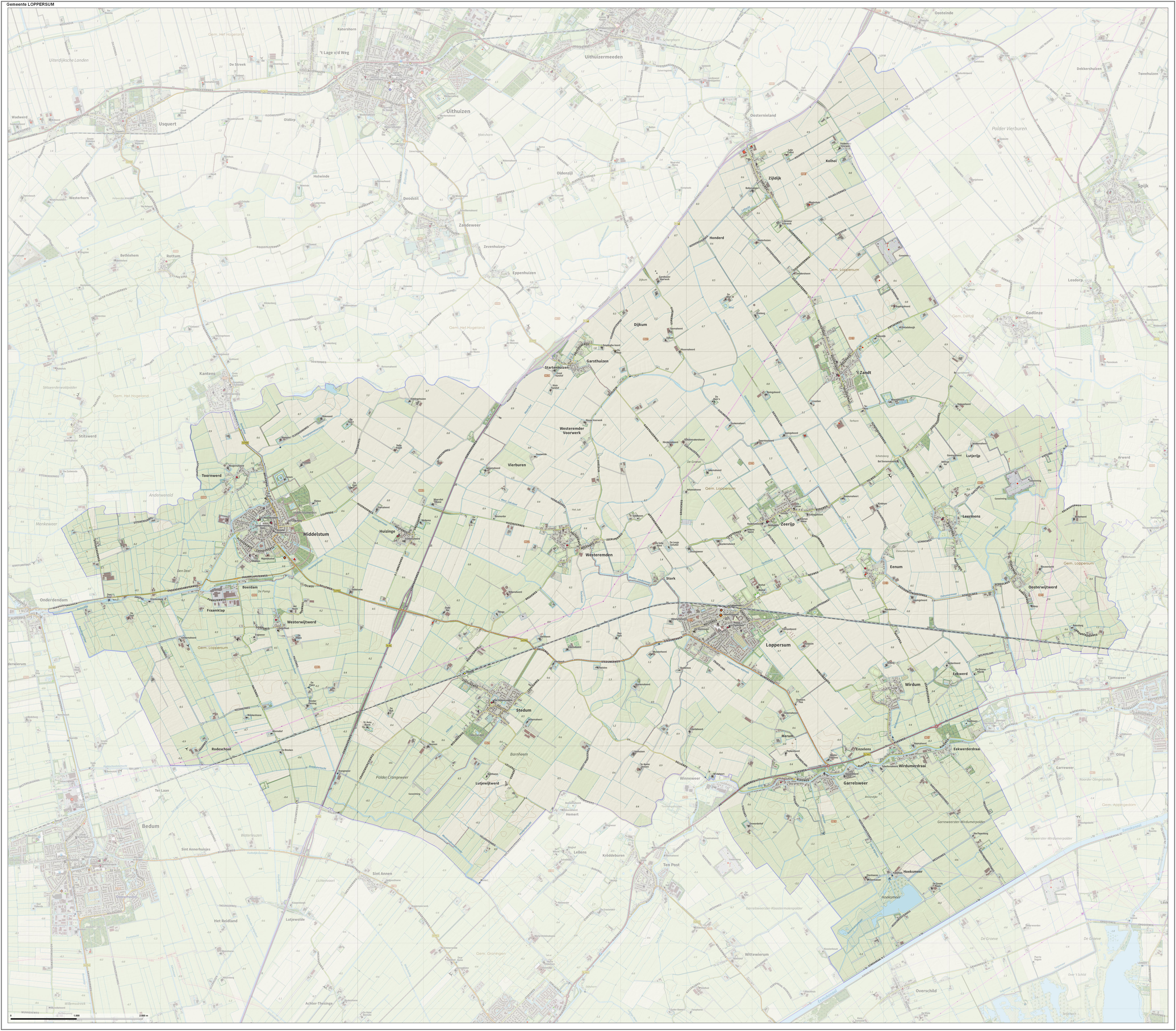 Topografische gemeentekaart. Resolutie: 400 pixels/km. Kaartbeeld samengesteld uit de open geodata van de Top10NL en Top25namen (Kadaster), Creative Commons-BY licentie. Gebouwvlakken uit open geodata BAG extract. Wegen uit de OpenStreetMap, OpenStreetMap community. Reliëfschaduw uit de Actuele Hoogtekaart AHN2. Samenstelling en kleurenschema: Jan-Willem van Aalst, met QGIS. Zie ook de Legenda.